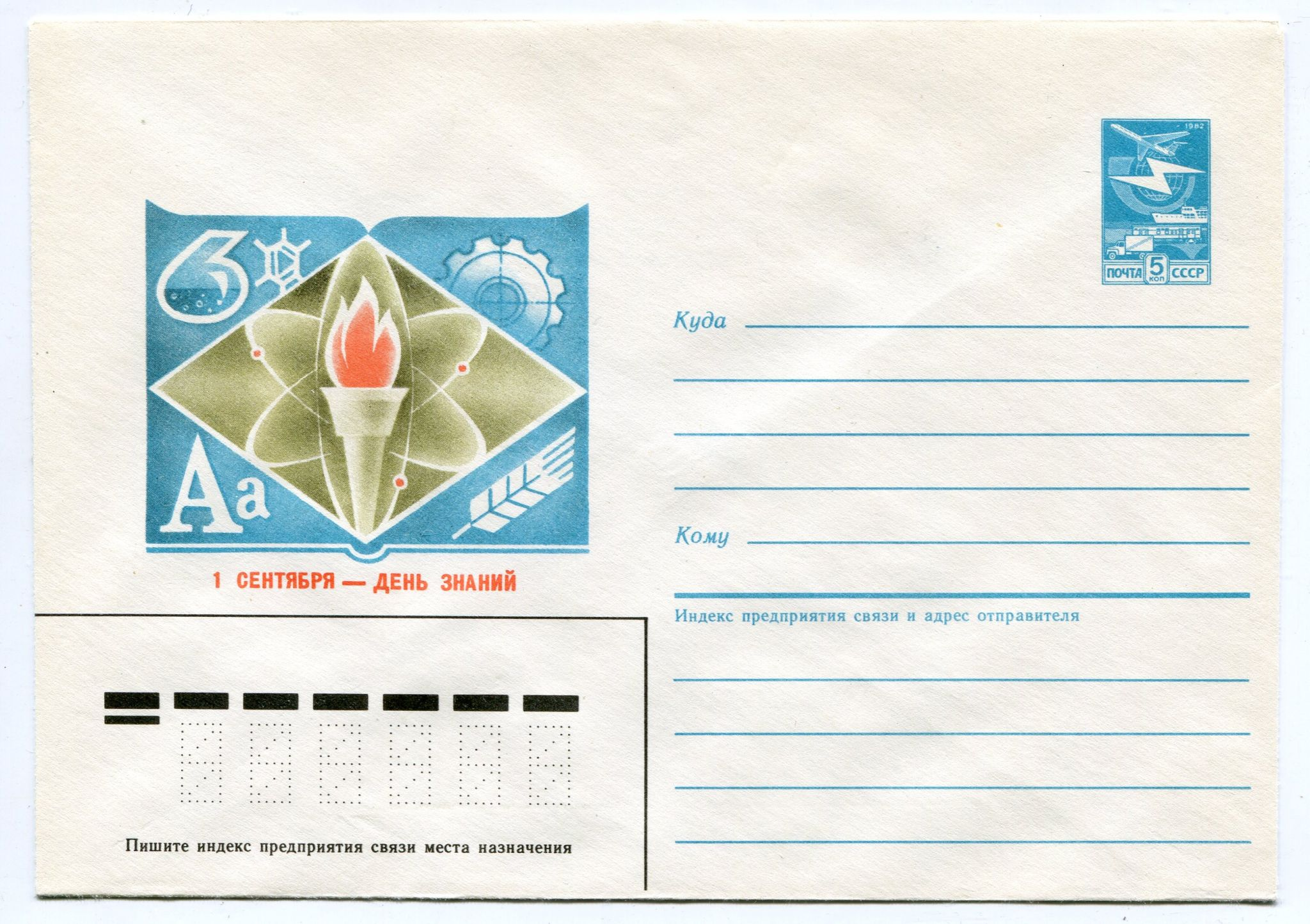 Художественный маркированный конверт, выпущенный ко Дню знаний в СССР в 1986 году.